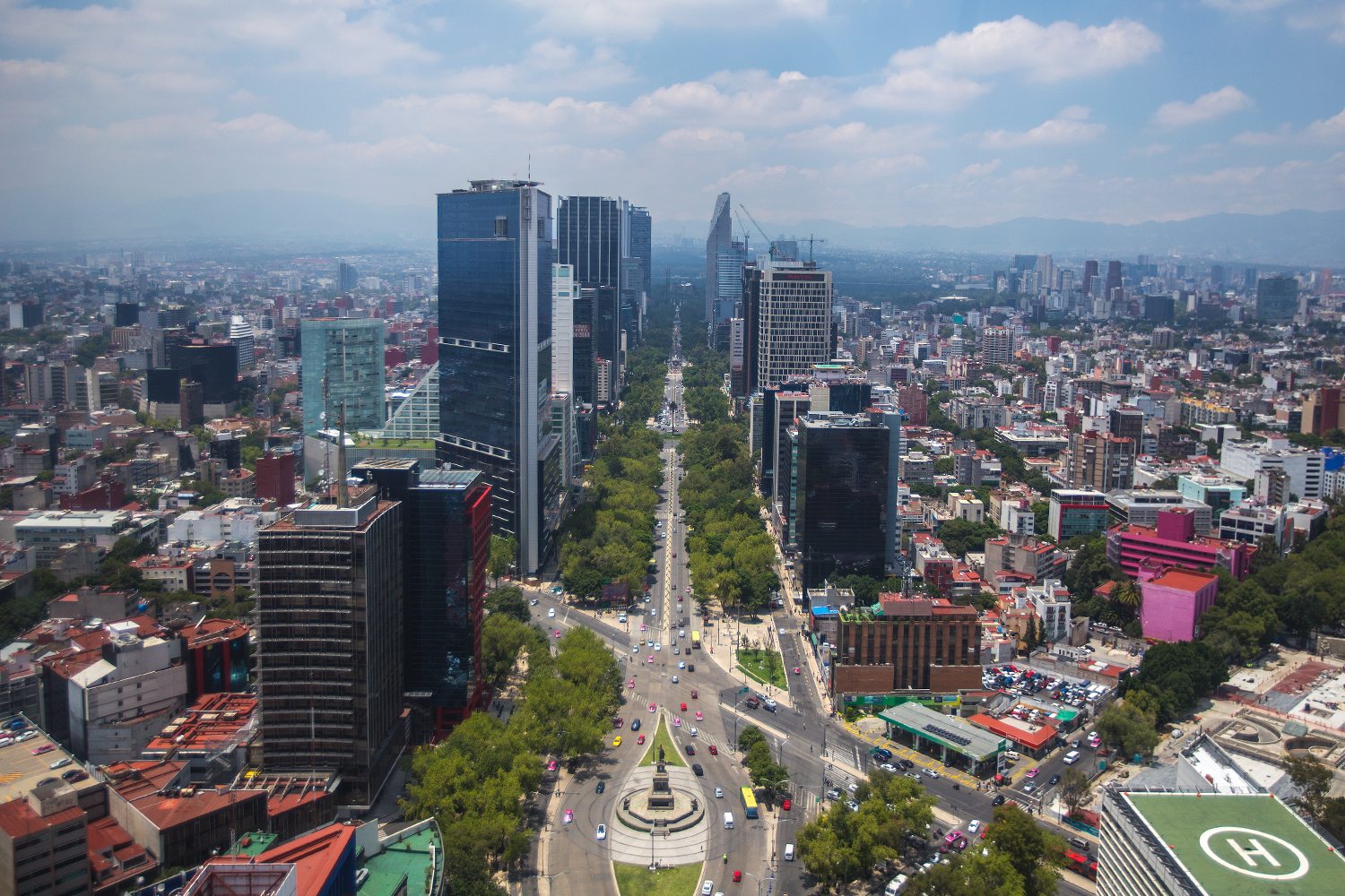 Fotografías de la Ciudad de México desde el aire.